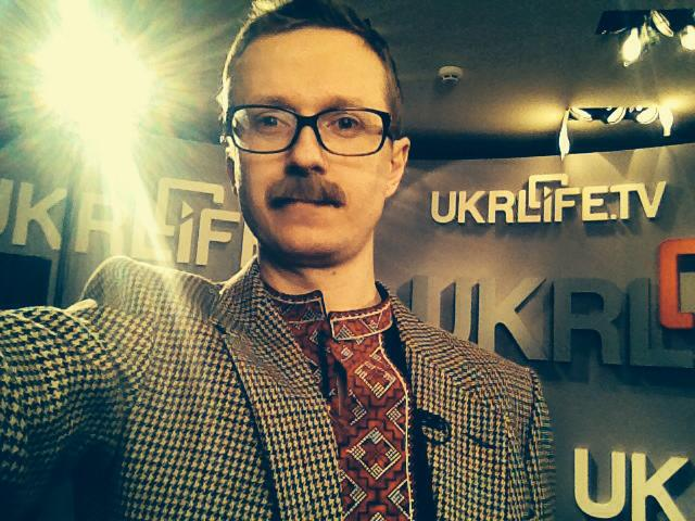 Майкл Щур